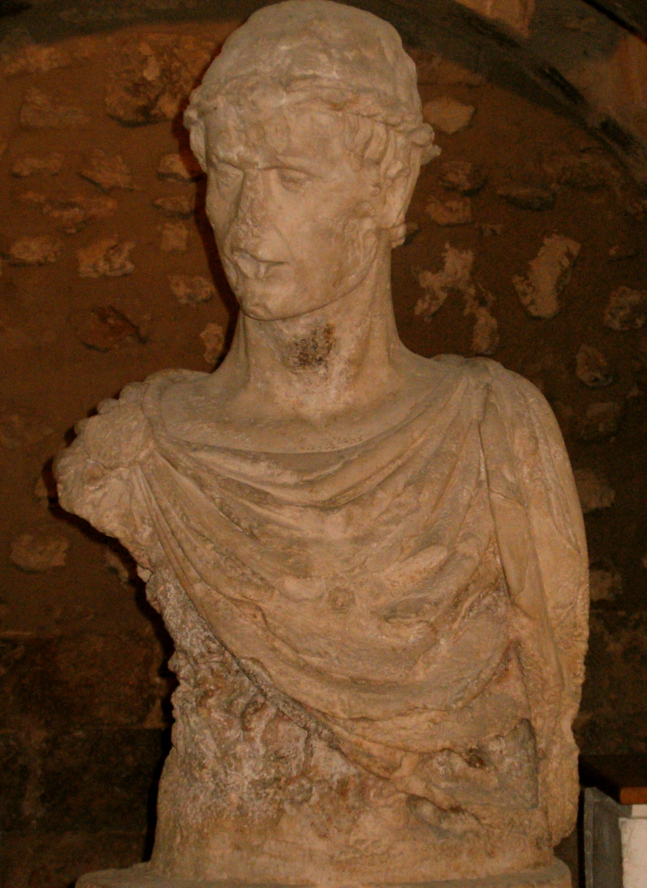 Busto di Federico II di Svevia (attribuito), Castello di Barletta, Italia